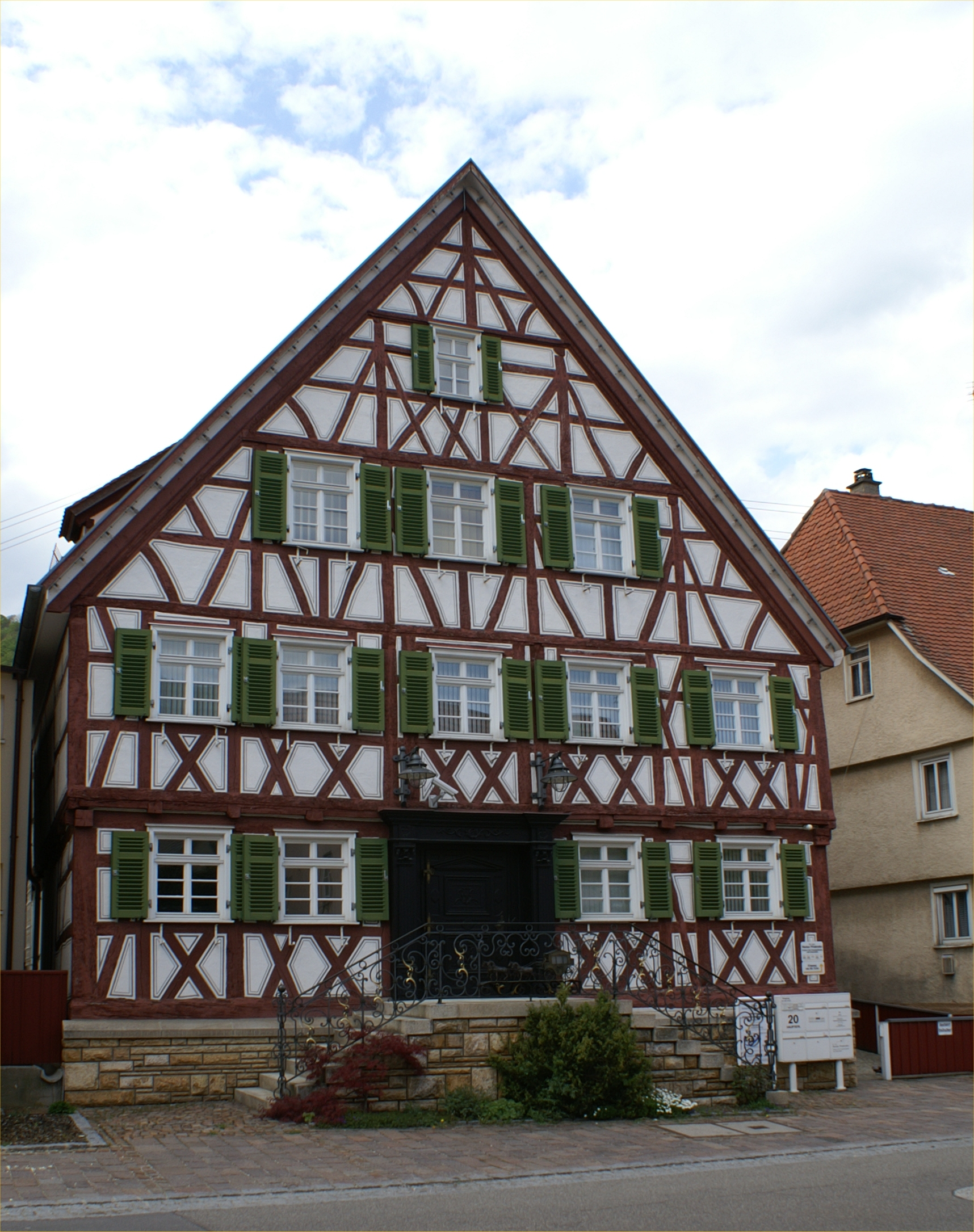 Das markante Fachwerkhaus in der Degginger Ortsmitte war früher der für seine ausgezeichnete Küche bekannte Gasthof Post